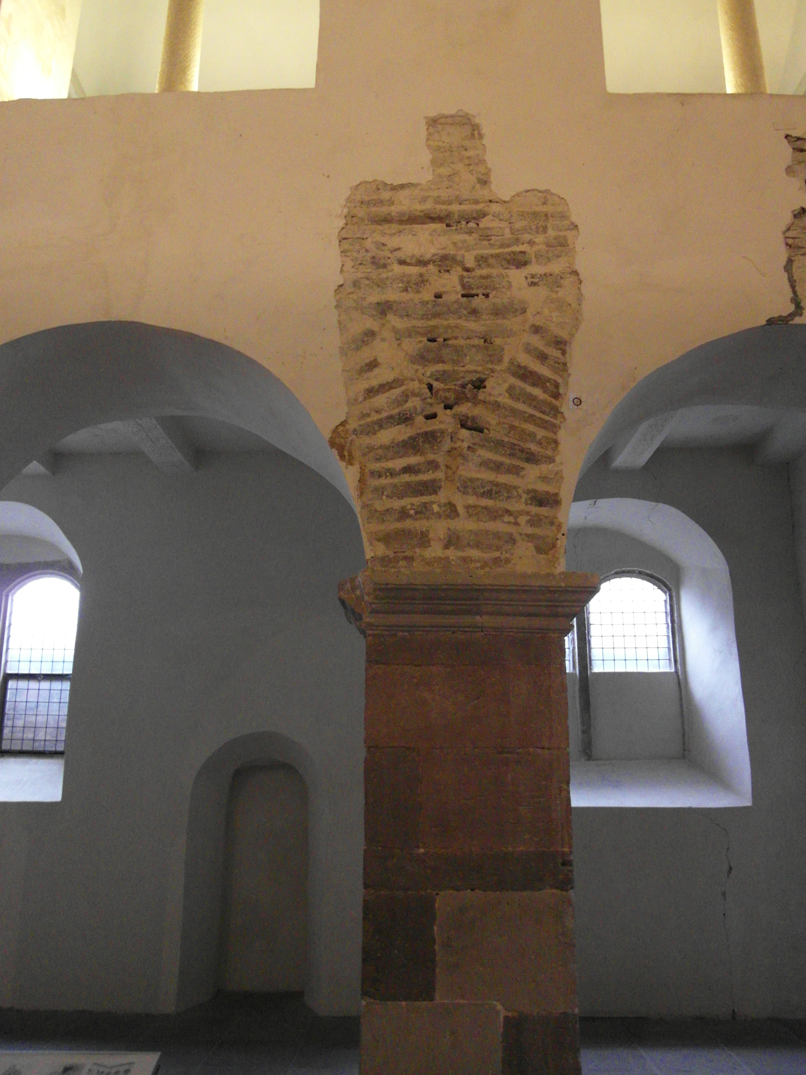 Die Stelle im Westwerk der Abteikirche von Corvey bei Höxter, an der sich ein Stuckrelief befand